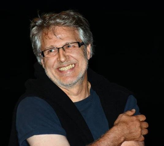 Nicolas Marié à l'avant-première du film "Neuf mois ferme"